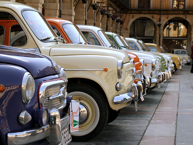 Estas fotos son muy viejas, de mediados de año. Se hizo una concentración de "600" en la Plaza mayor y había como seiscientos autitos. Bueno, no eran tantos, pero valga esta foto como muestra de que eran un montón...